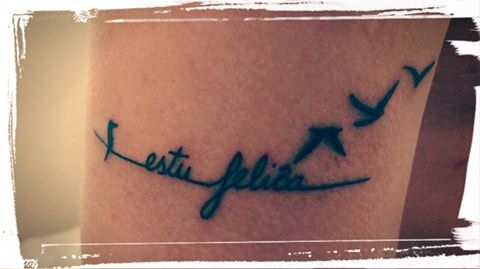 tatuo (tatuaĵo) en la internacia lingvo Esperanto Permesiloj: Kategorio:Vidaj artoj Kategorio:Homa korpo Kategorio:Subkulturoj